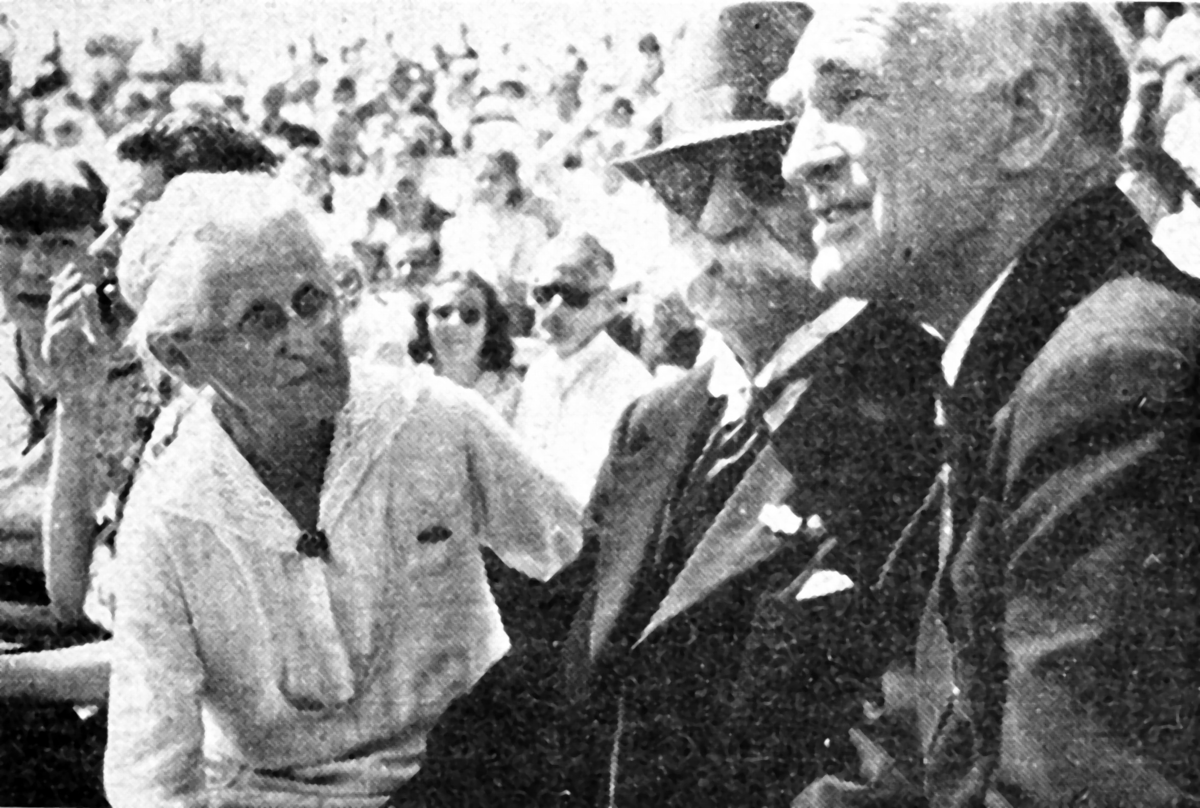 UK 1948. Esperanto-pioniroj. F-ino Noll, S-roj Nylen kaj Fjodor Postnikov.